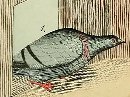 Tafel 1 aus Gottlob Neumeister's Das Ganze der Taubenzucht Die gemeine Feld-Taube. Die Hohl-Taube. Die Eis-Taube. Die Staarhalsige-Taube. Das sogenannte Weißblässchen.